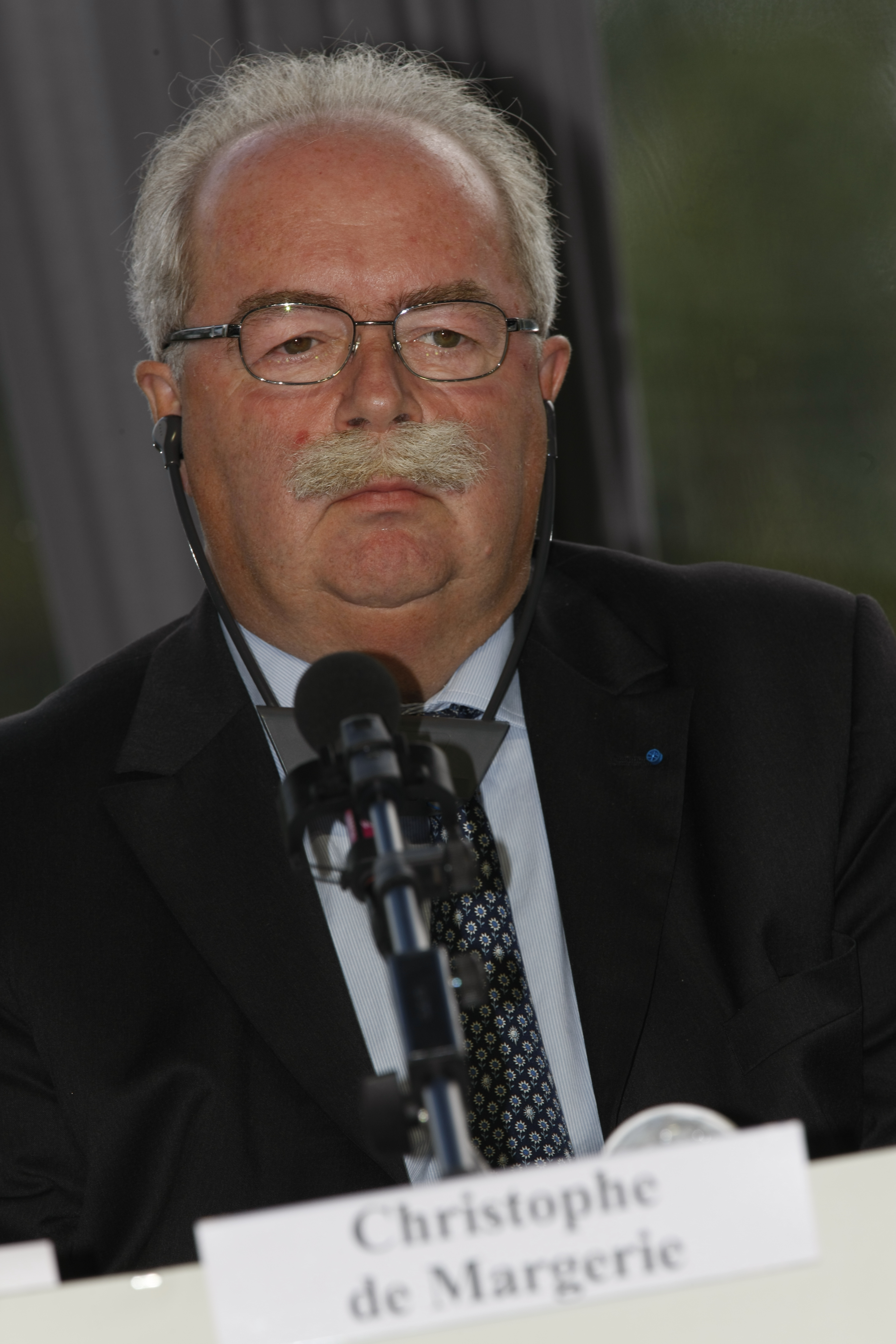 Christophe Jacquin de Margerie à l'université d'été du MEDEF 2009.